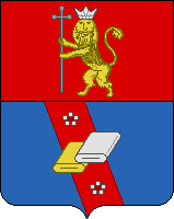 Герб города Карабаново (1999 года), Владимирская область